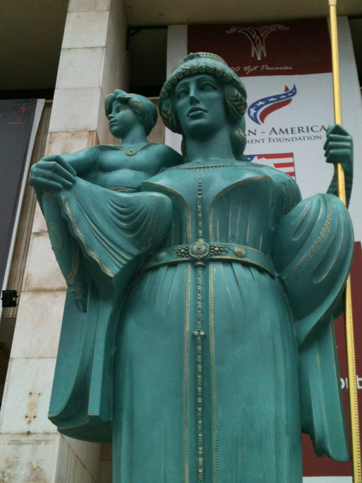 Statue der Illyrischen Königin Teuta mit ihrem Stiefsohn Pinnes in Tirana, Hauptstadt von Albanien